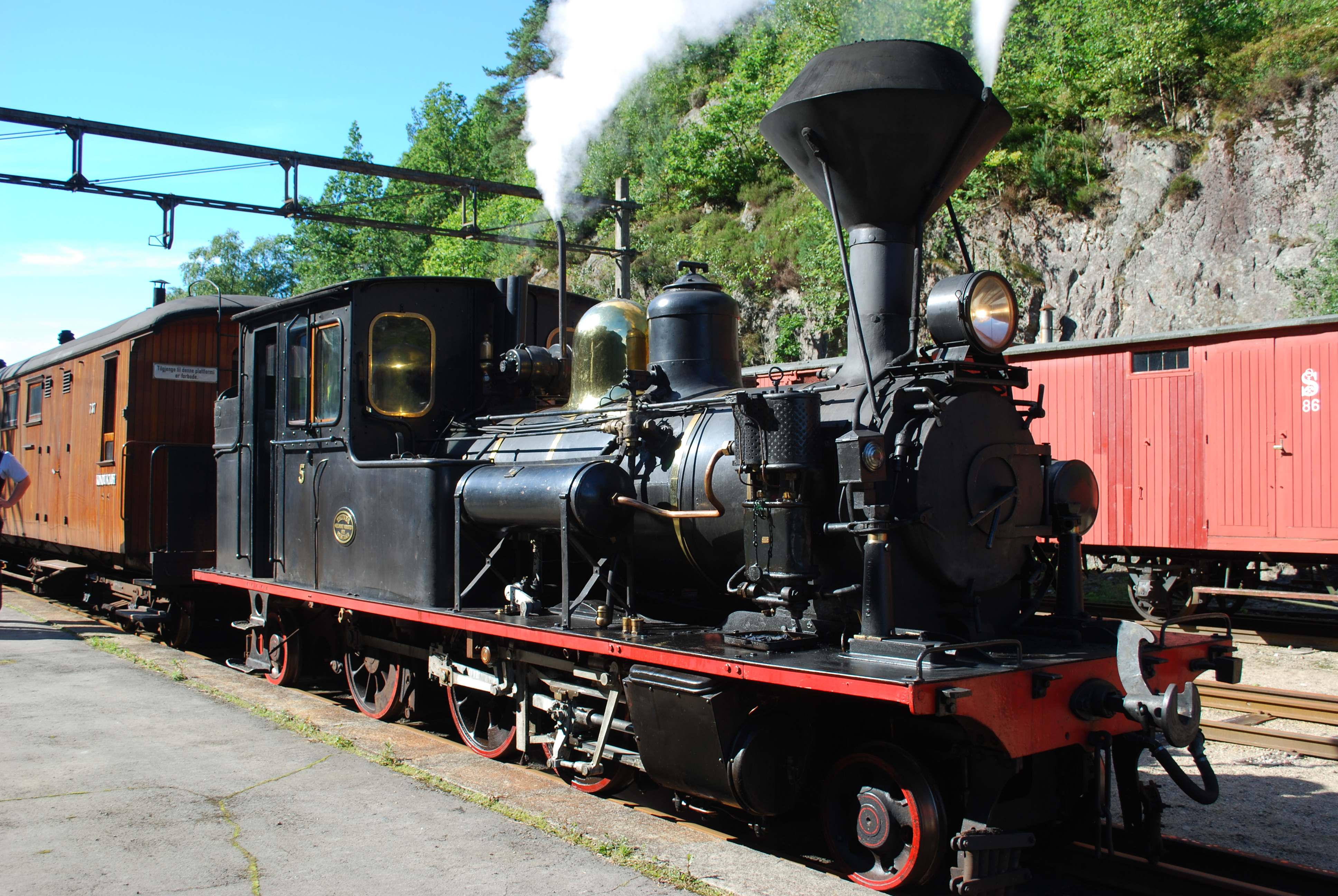 Lok 5 klar for avgang